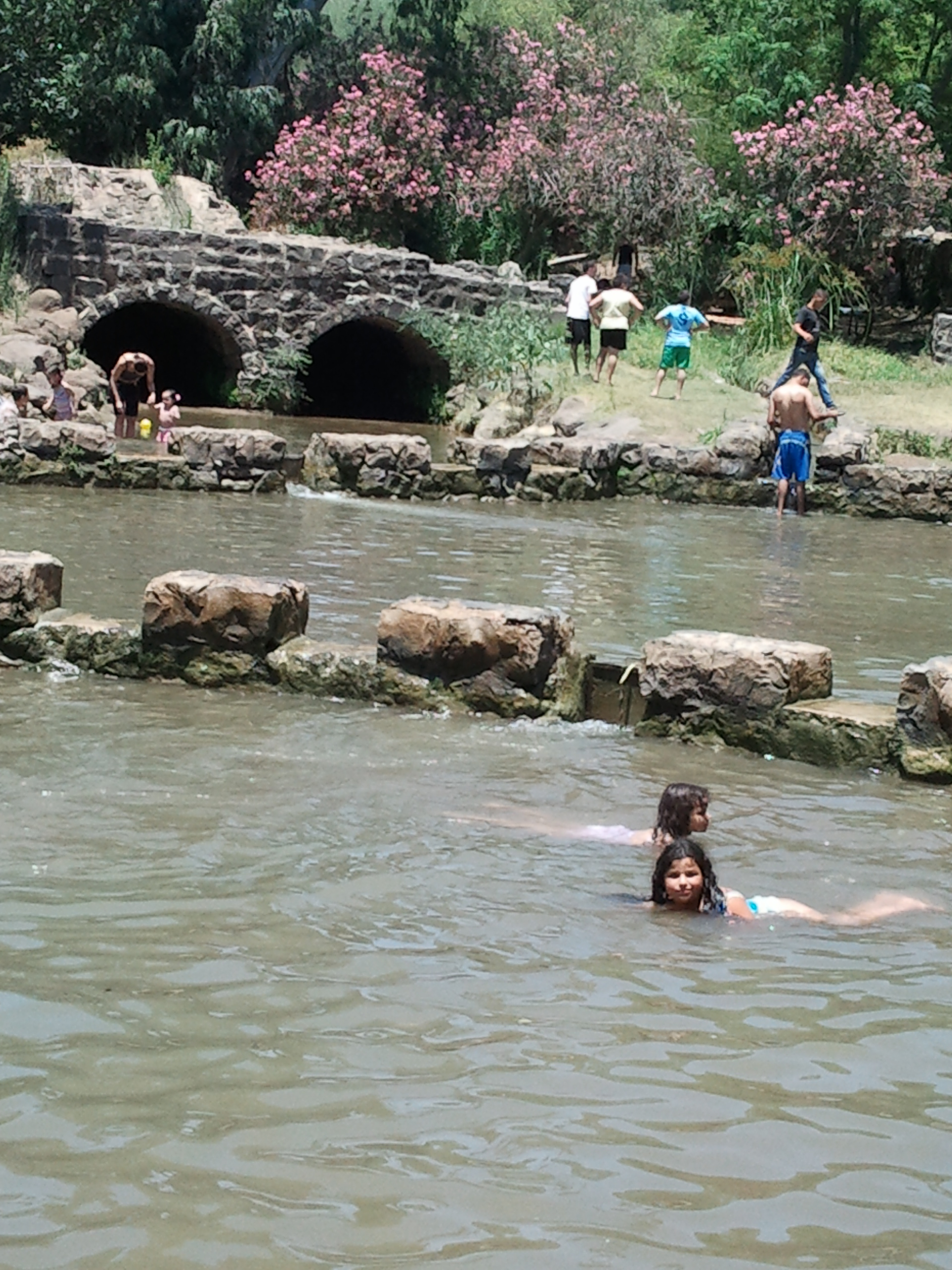 Category:Jordan River park, northern from Sea of Galilee, Israel פארק הירדן שוכן בצפונה של הכנרת. בתחום הפארק נמצא תל בית צידה הבריכה באזור טחנות הקמח